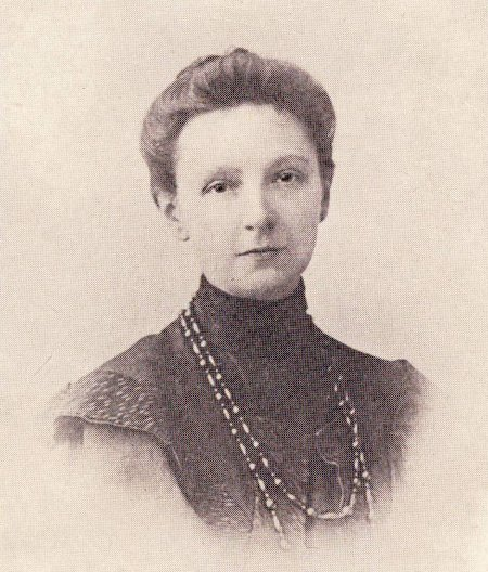 Elisabeth Leseur